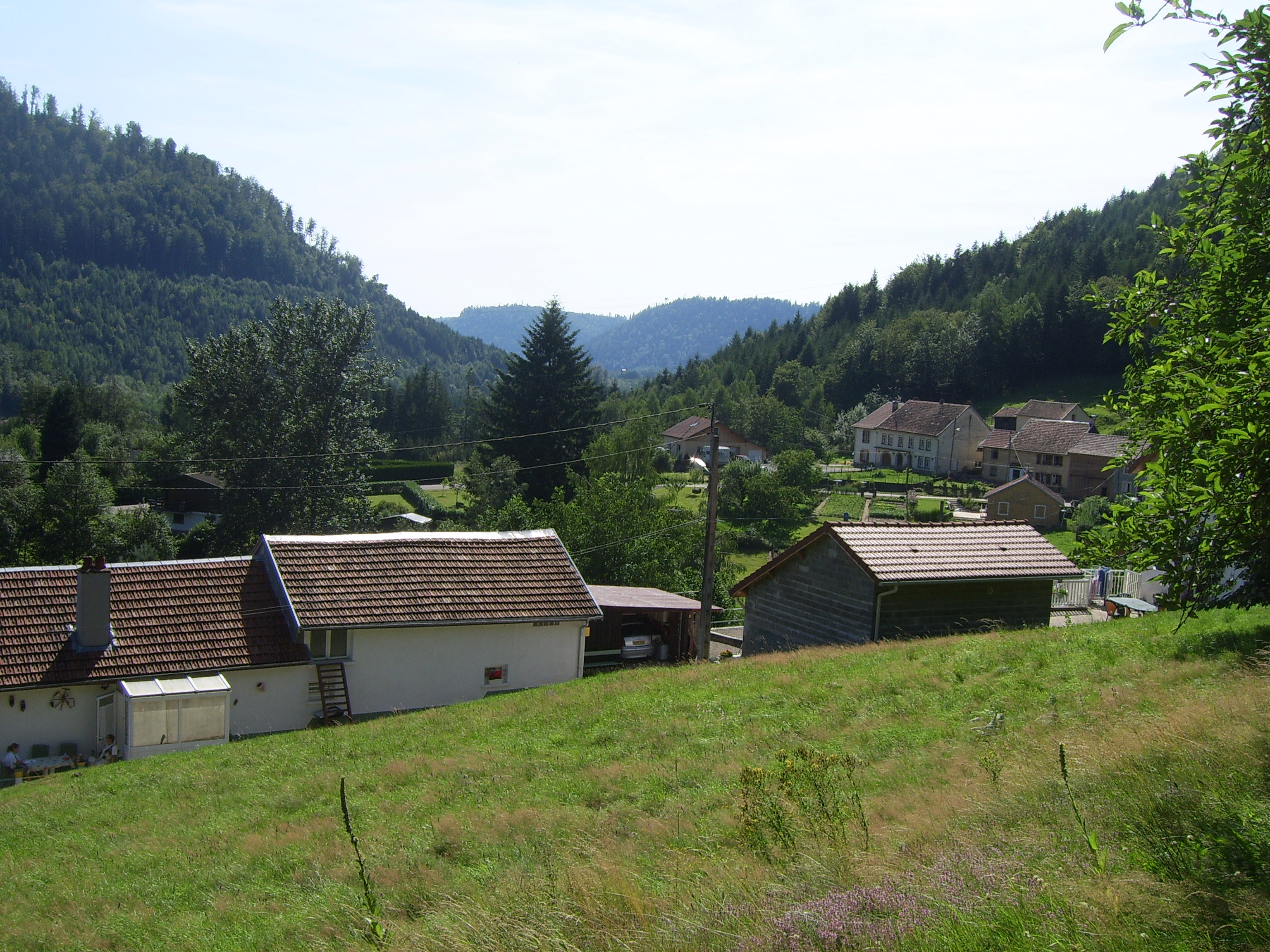 Lieu-dit "Les noires colas" à Bionville(Meurthe-et-moselle)